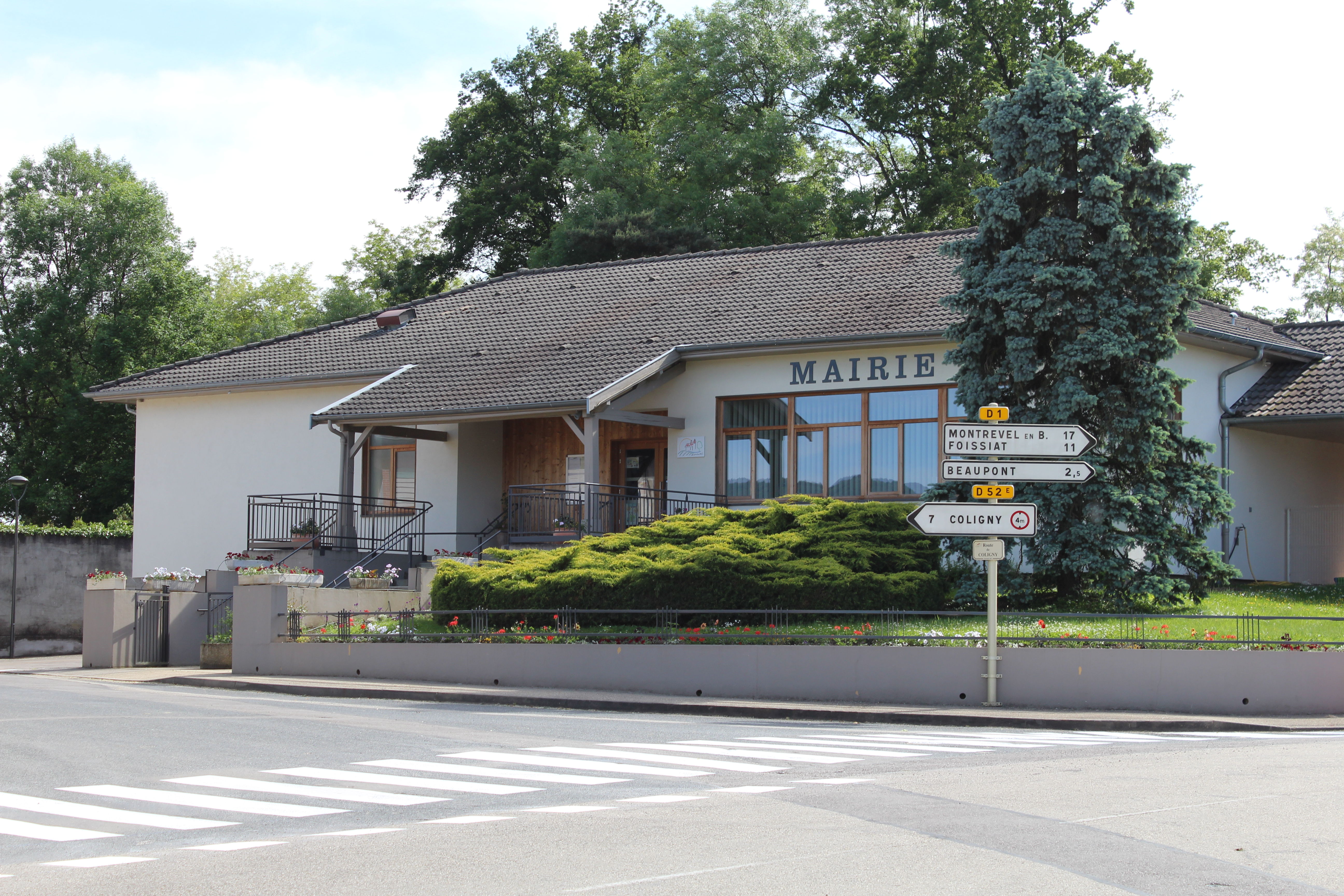 Mairie de Domsure.